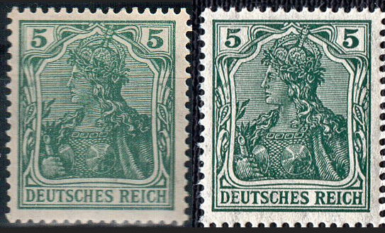 Vergleich der Farbtönungen der Michel Nr. 85 IIa (links)"(dunkel)opalgrün bis schwärzlich (grau)grün" mit der 85 IIe(rechts) "schwarzopalgrün"